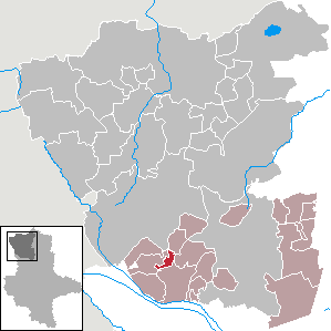 (Original text: Peckfitz im Altmarkkreis Salzwedel)